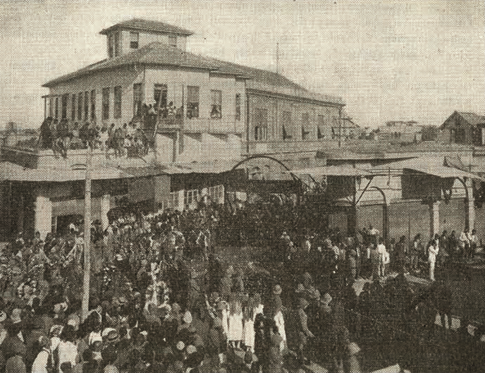 Ermeni Ulusal Birliği'nin Adana'daki Kilikya Genel Merkezi